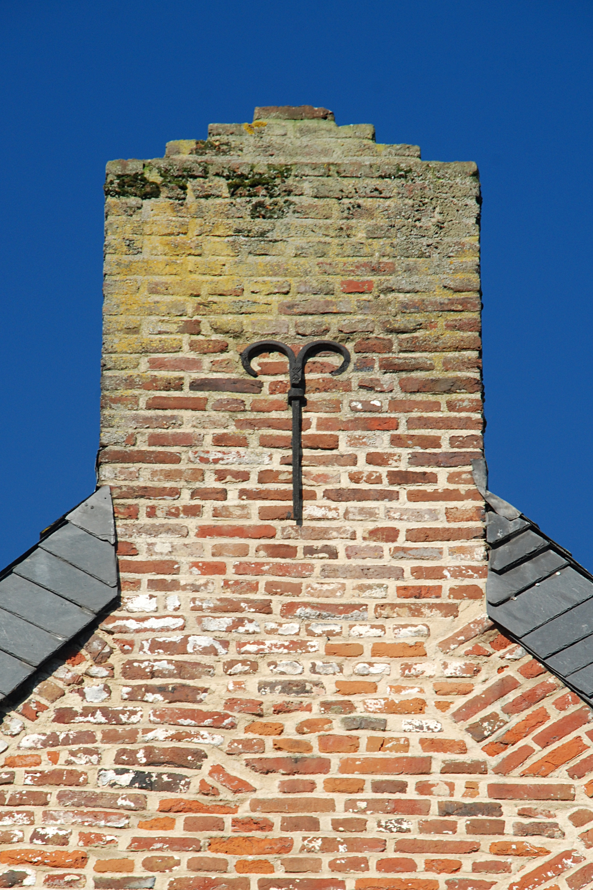 Belgique - Wallonie - Ottignies - Ferme du Douaire